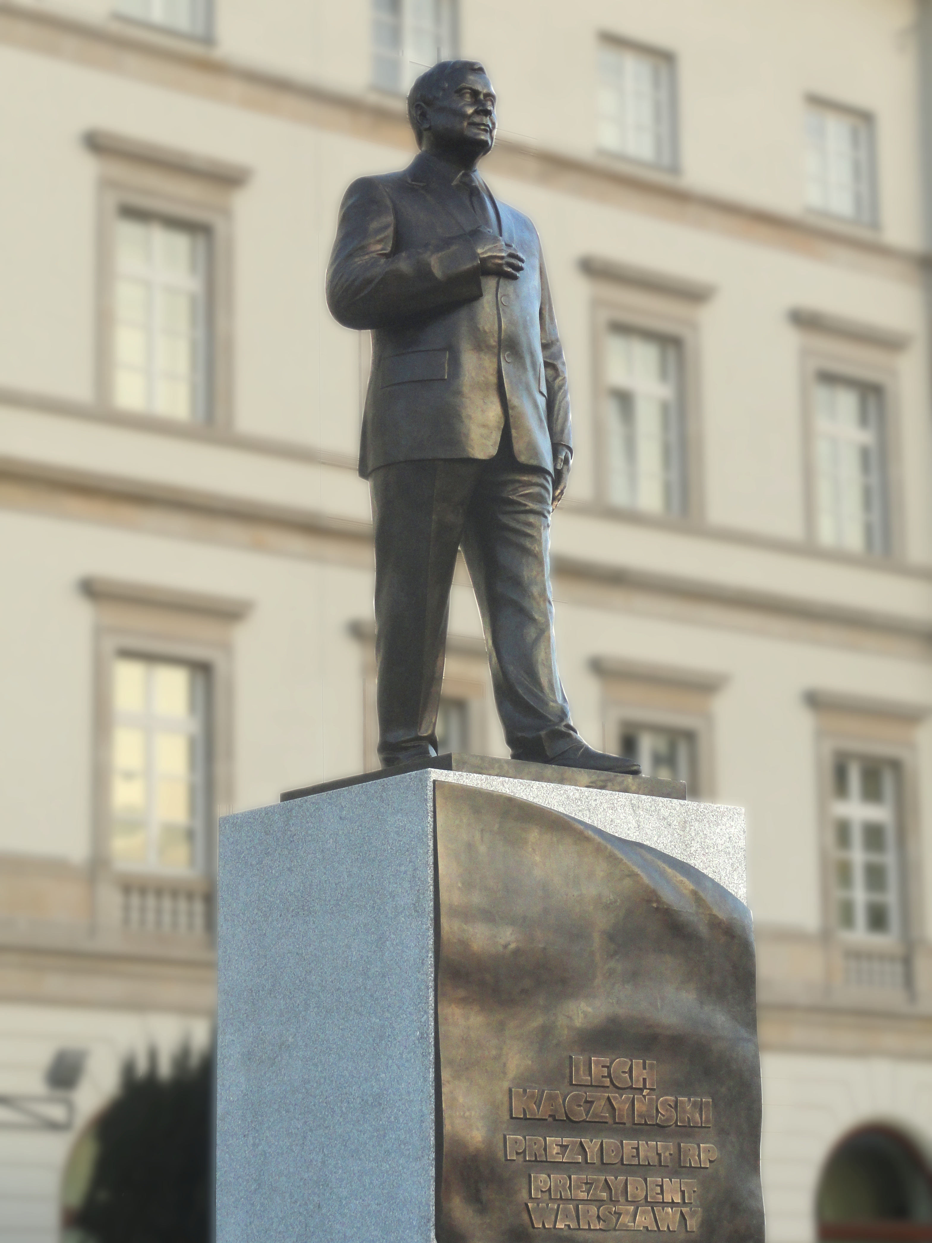 Budowa pomnika prezydenta Lecha Kaczyńskiego przy Placu Piłsudskiego w Warszawie.